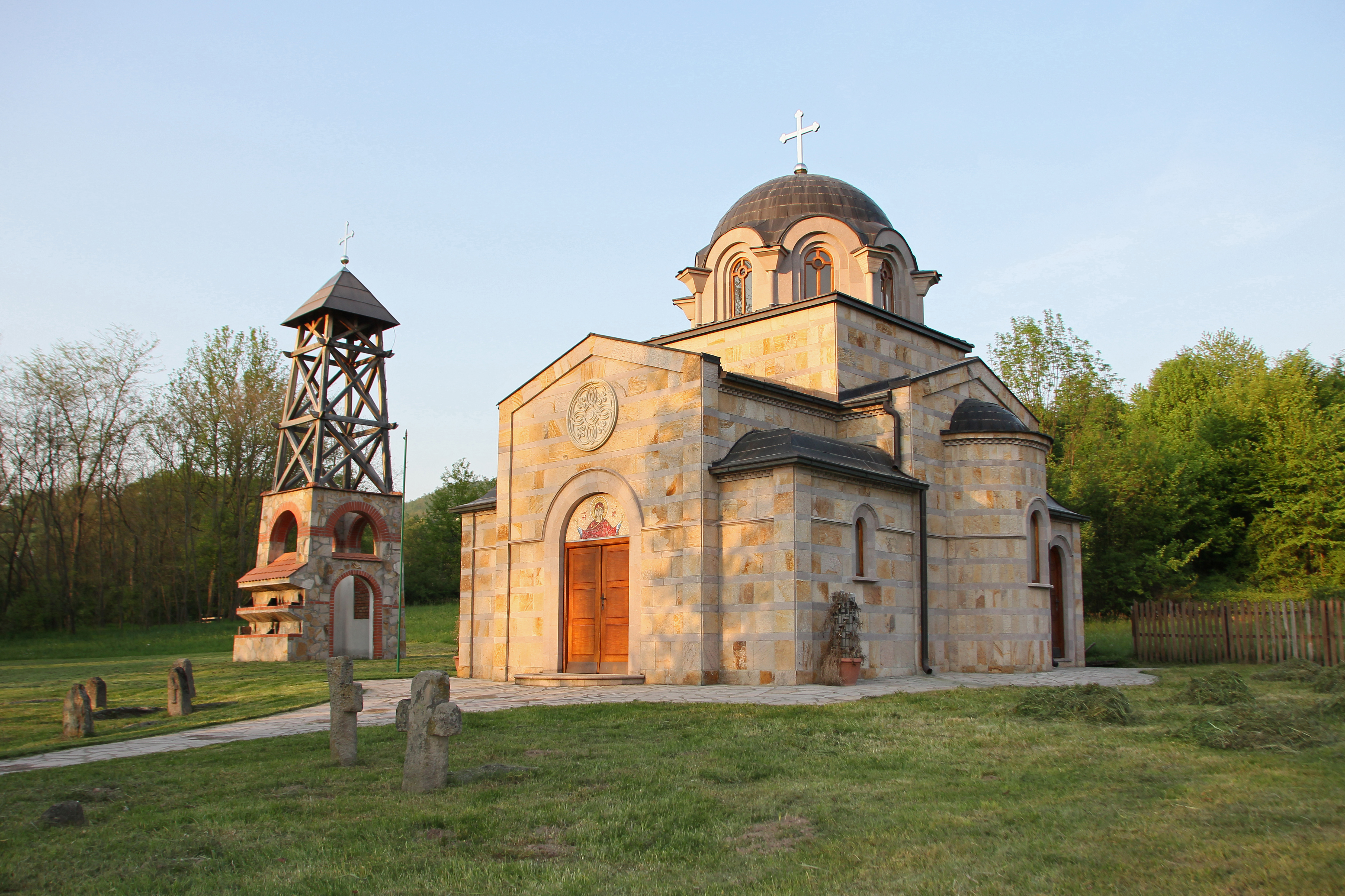 Jablanica (Gornji Milanovac)